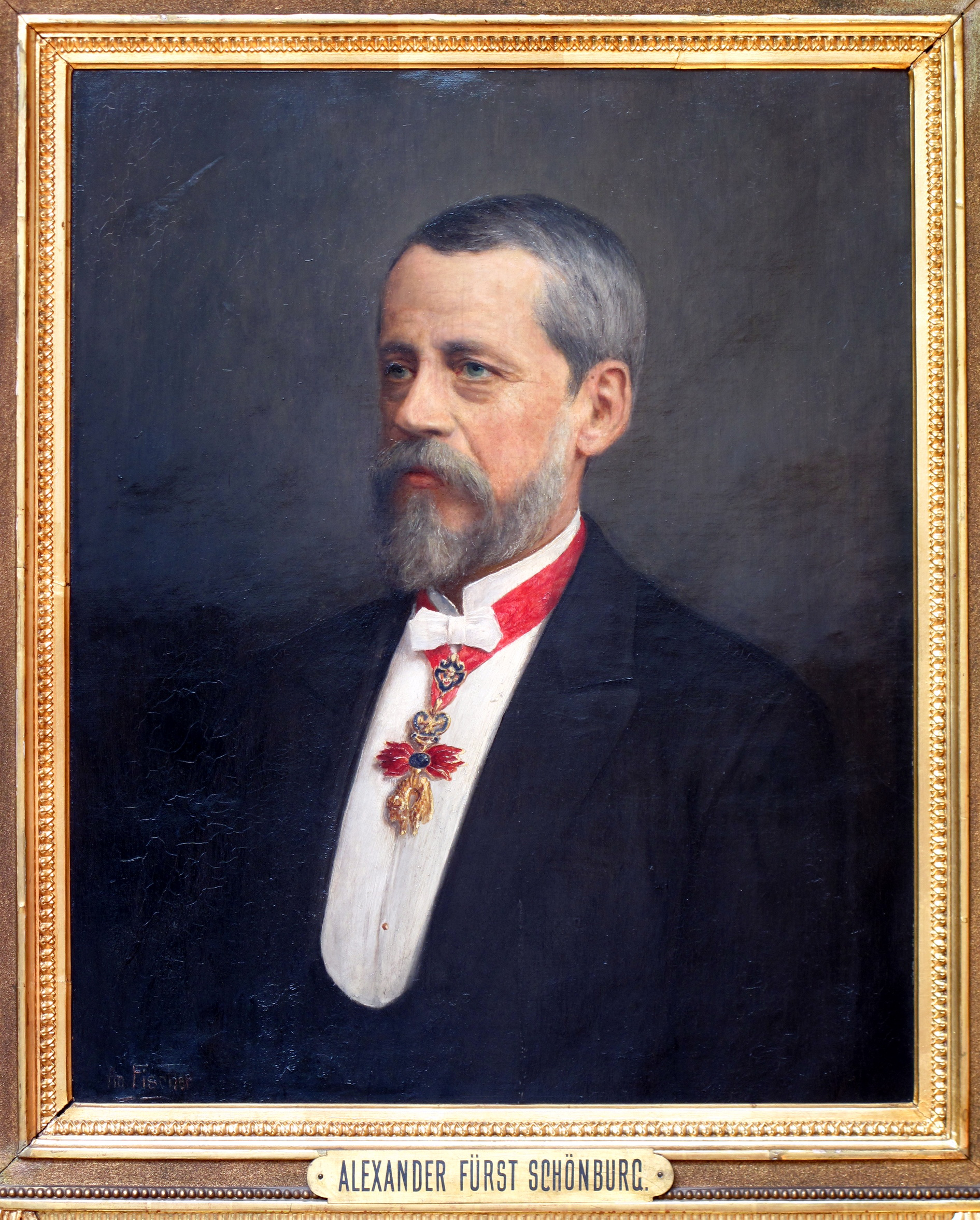 Portrait of Alexander Schönburg-Hartenstein